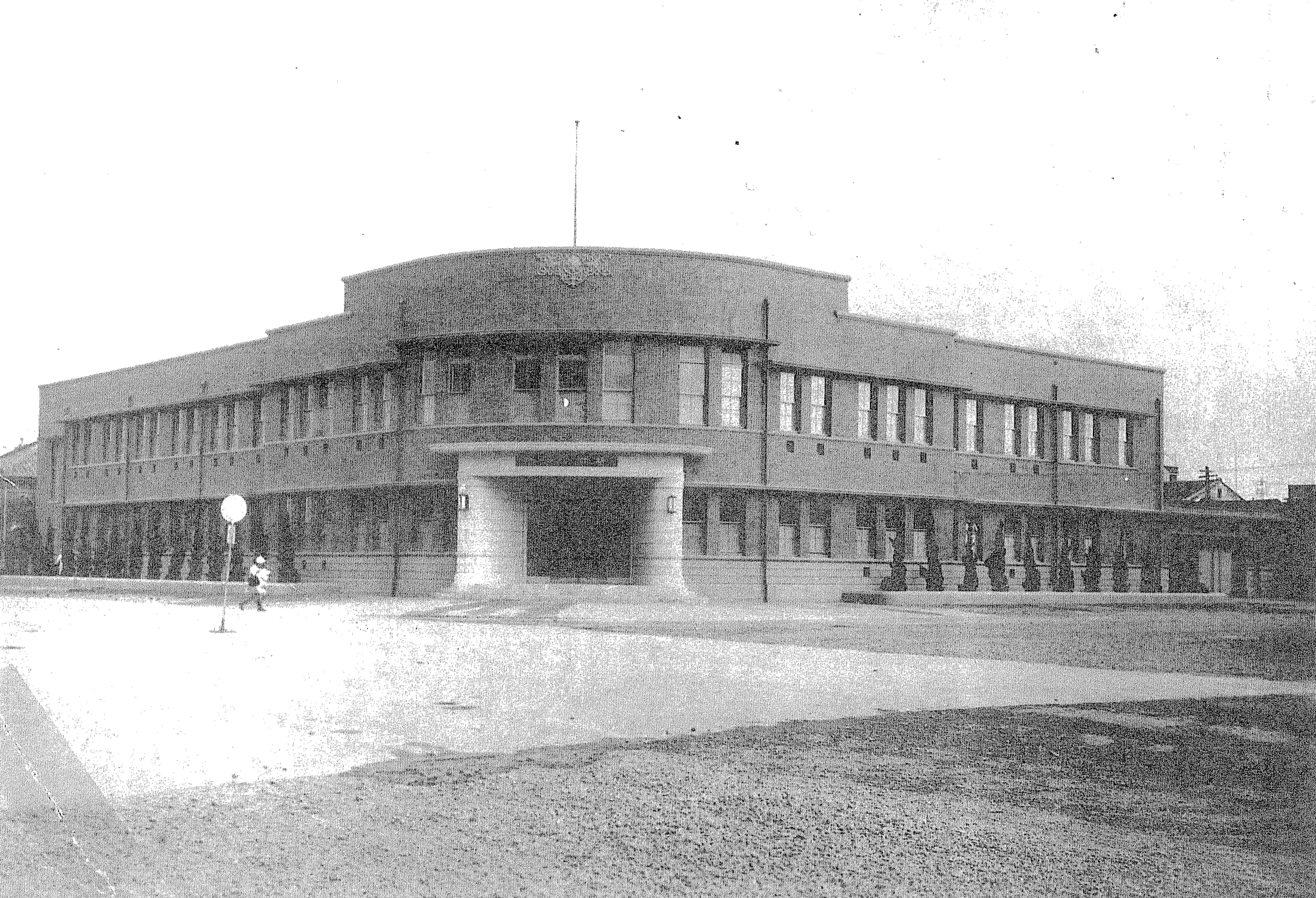 中文（台灣）: 新竹警察署，現為新竹市警察局